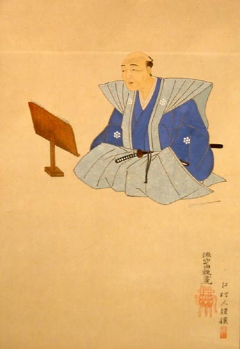 青柳種信肖像 福岡県立図書館所蔵